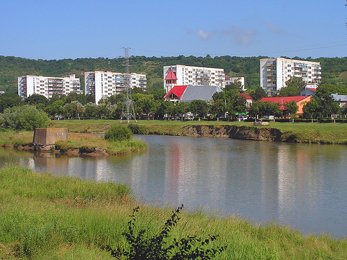 A kolozsvári Donát (Grigorescu) negyed tömbházai, a Kis-Szamos partján, Pasztilla jóvoltából és engedélyével.